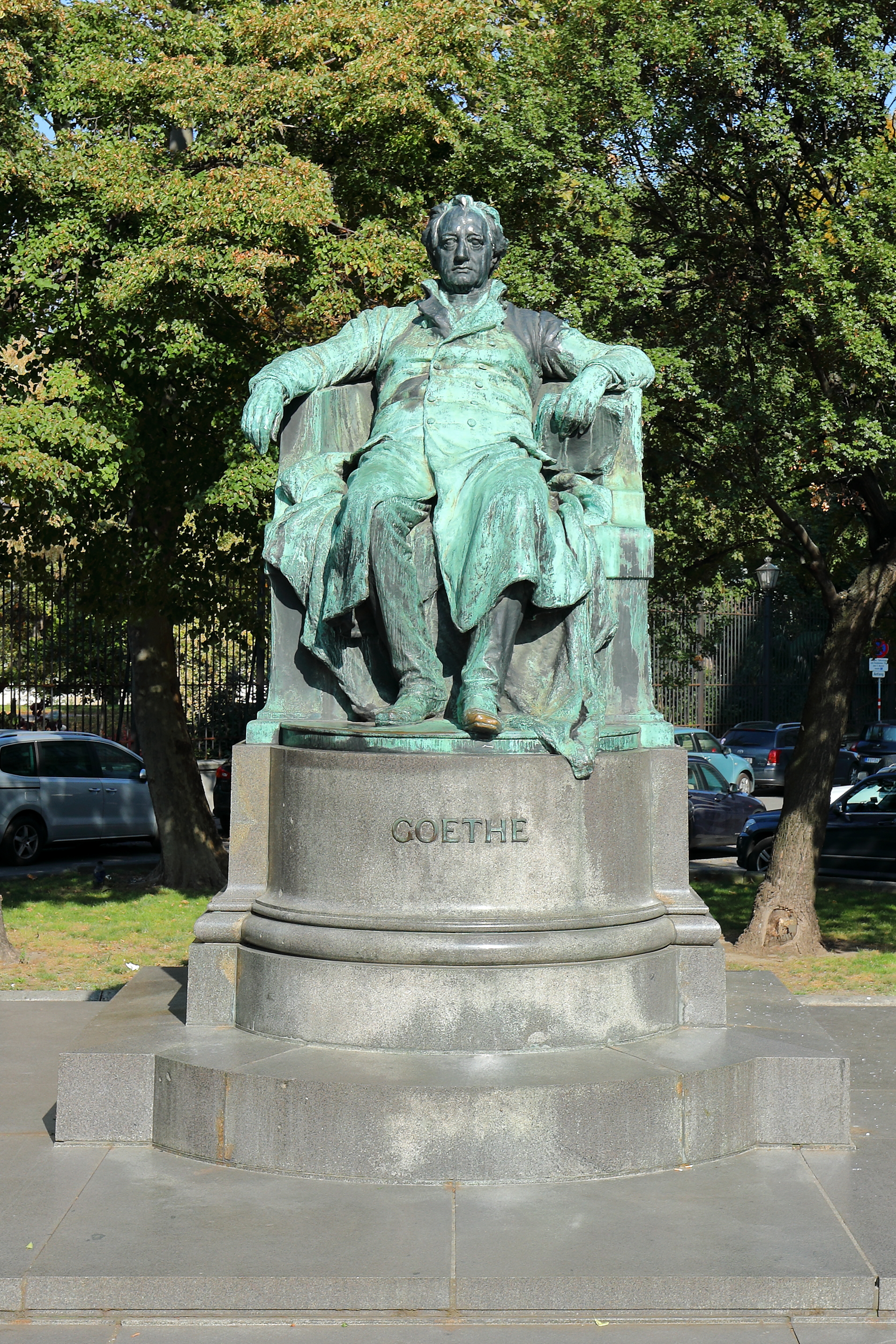 Das Goethedenkmal zwischen dem Palais Friedrich Schey von Koromla und dem Burggarten bzw. an der Ecke Opernring/Goethegasse im 1. Bezirk der österreichischen Bundeshauptstadt Wien. Das Denkmal zu Ehren Johann Wolfgang von Goethe wurde von Edmund von Hellmer entworfen und am 15. Dezember 1900 enthüllt.